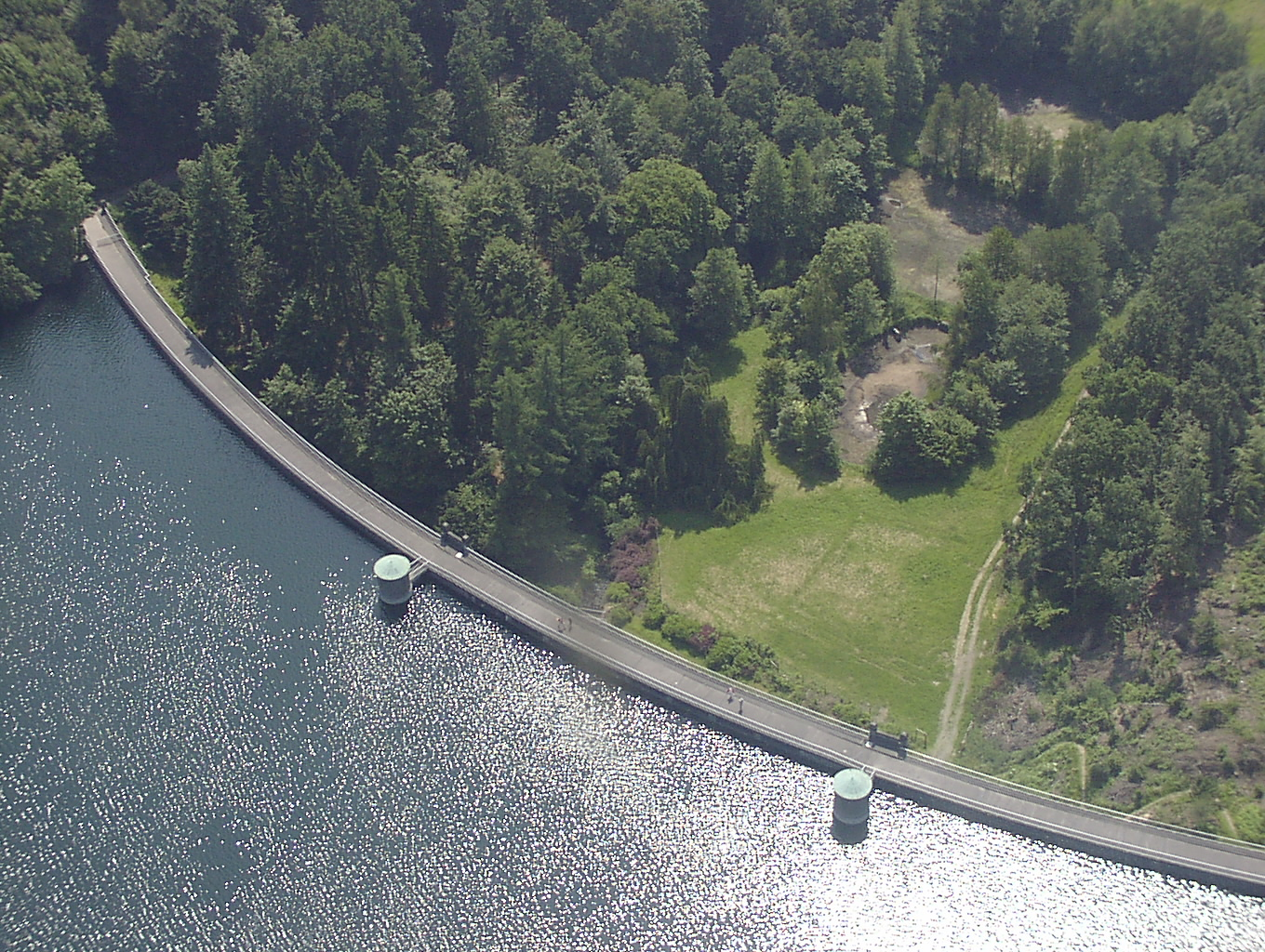 Neyetalsperre